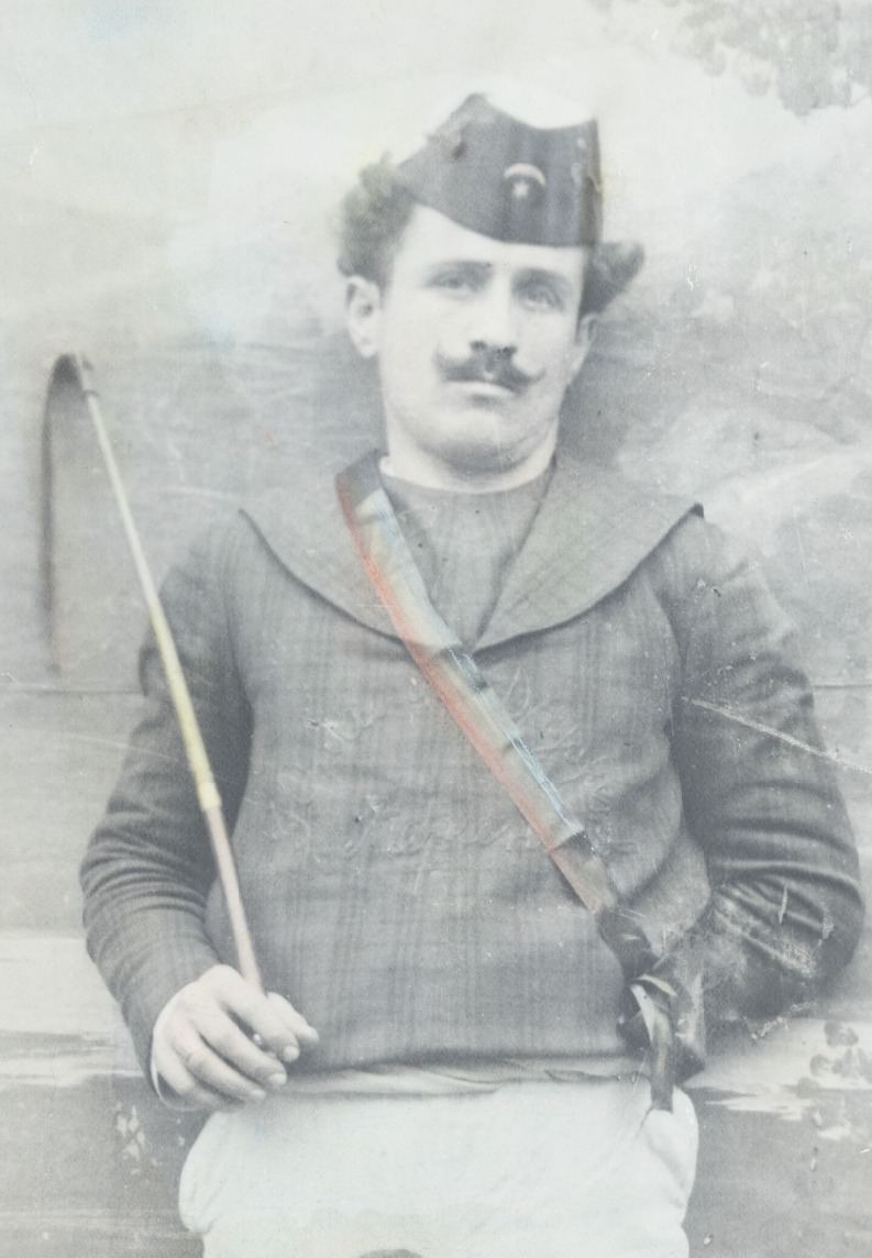 Стефан Ролев